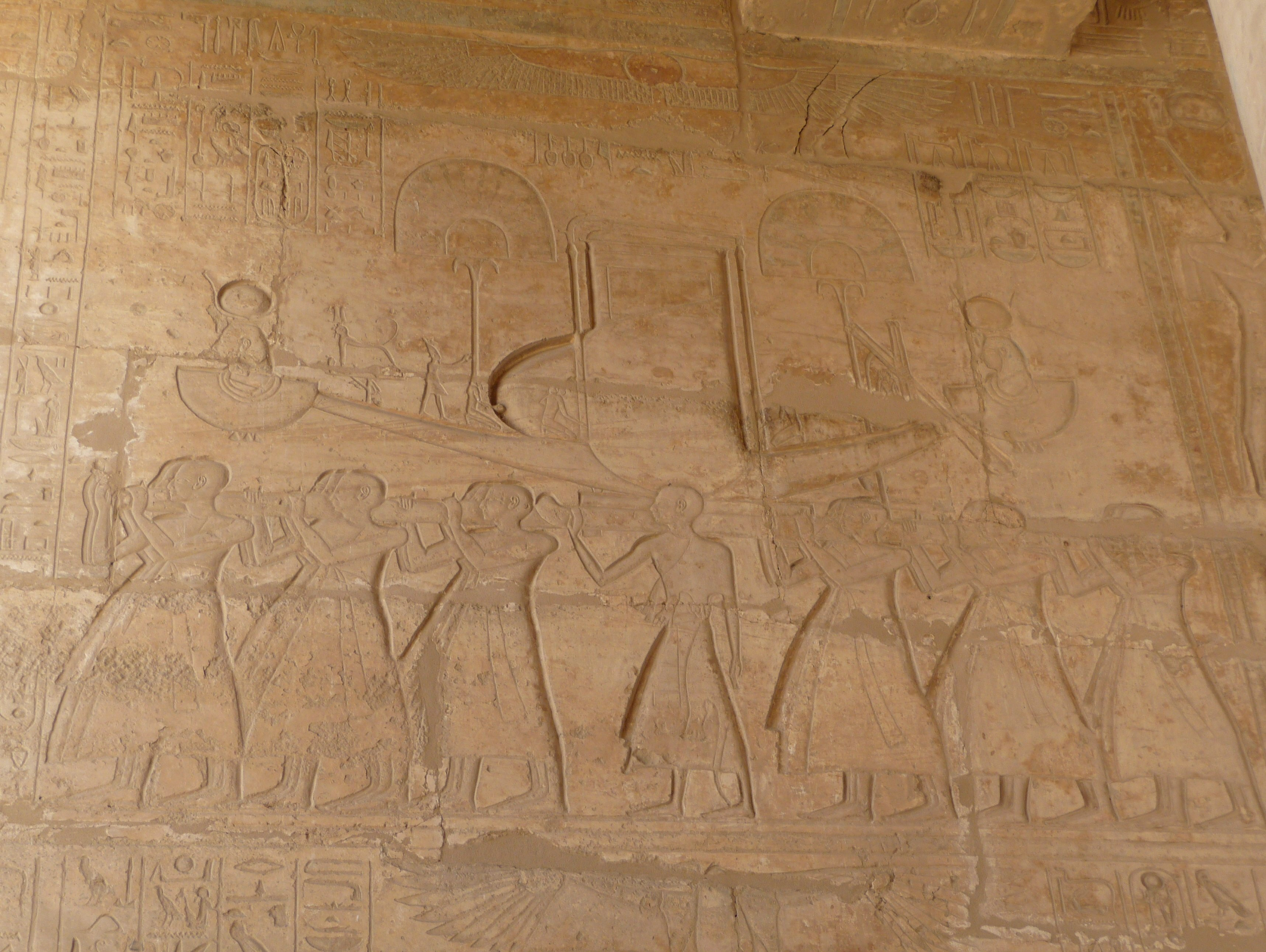 Ramesses II Temple